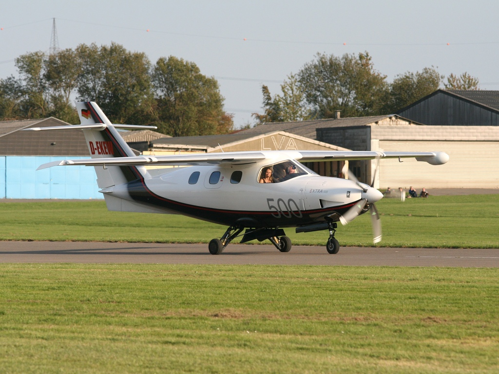 Extra EA-500 (at Aachen Merzbrück)